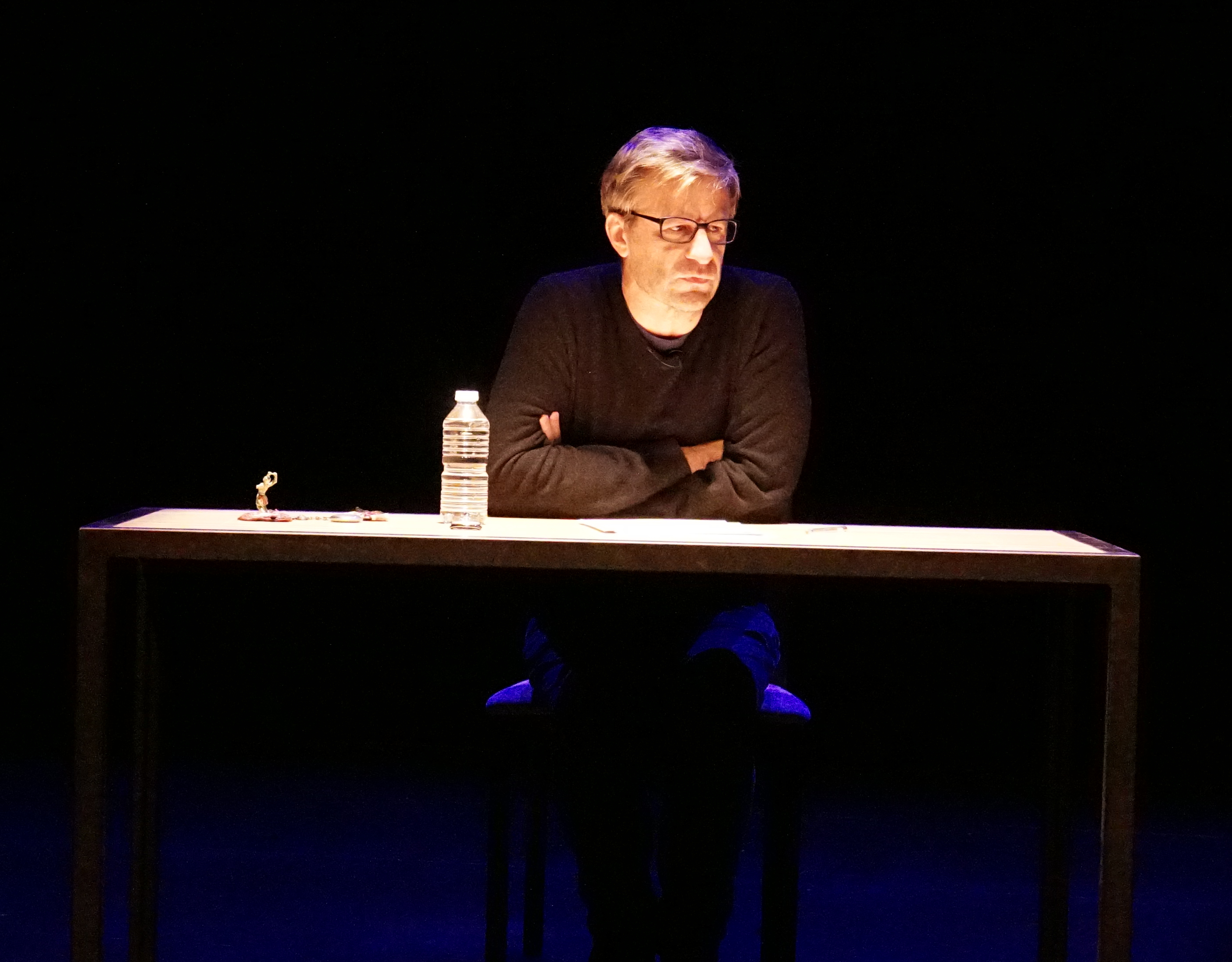 Jean Yves Jouannais lors de "l'encyclopédie des guerres" à Reims